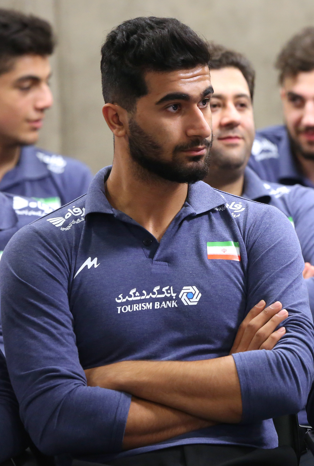 دیدار علی خامنه‌ای با تیم ملی والیبال جوانان ایران